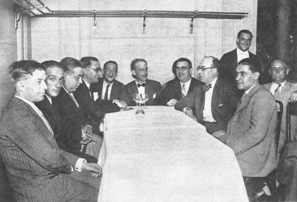 Original caption: Rodeando a nuestro compañero Jorge de Alba, algunos de los nuevos diputados que Galicia envía a las Cortes Constituyentes, posan para CRÓNICA